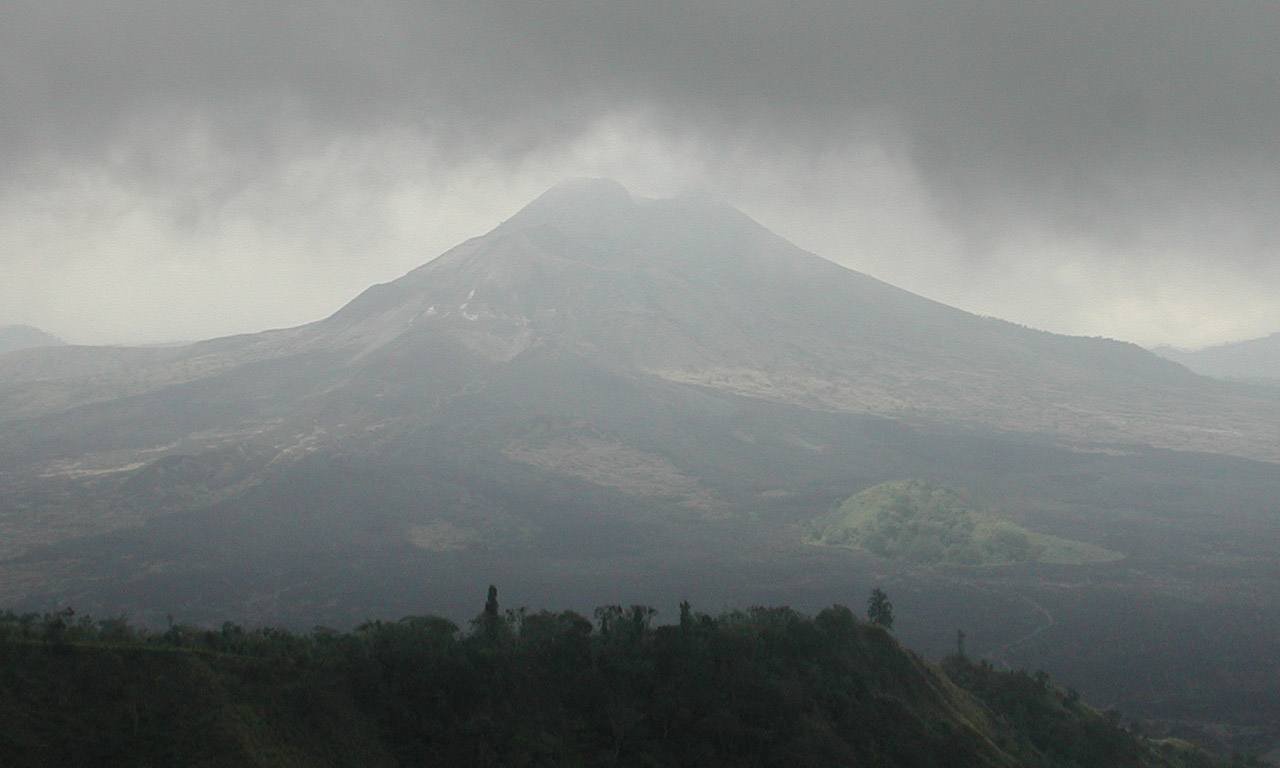 Gunung Batur from Kintamani, Bali, Indonesia nb: it's in the caldera!